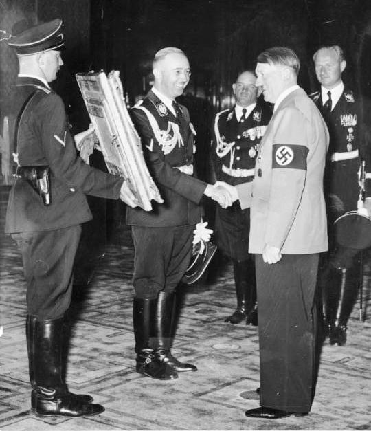 Zentralbild Der Reichsführer-SS und Chef der deutschen Polizei Heinrich Himmler überbringt am 19.4.1939 Adolf Hitler seine Glückwünsche zu dessen 50. Geburtstag. U.B.z: v.l.: [Heinrich] Himmler, SS-Obergruppenführer Sepp Dietrich, Adolf Hitler und Karl Wolff Aufnahme: Hoffmann 5120-39 [Scherl Bilderdienst]